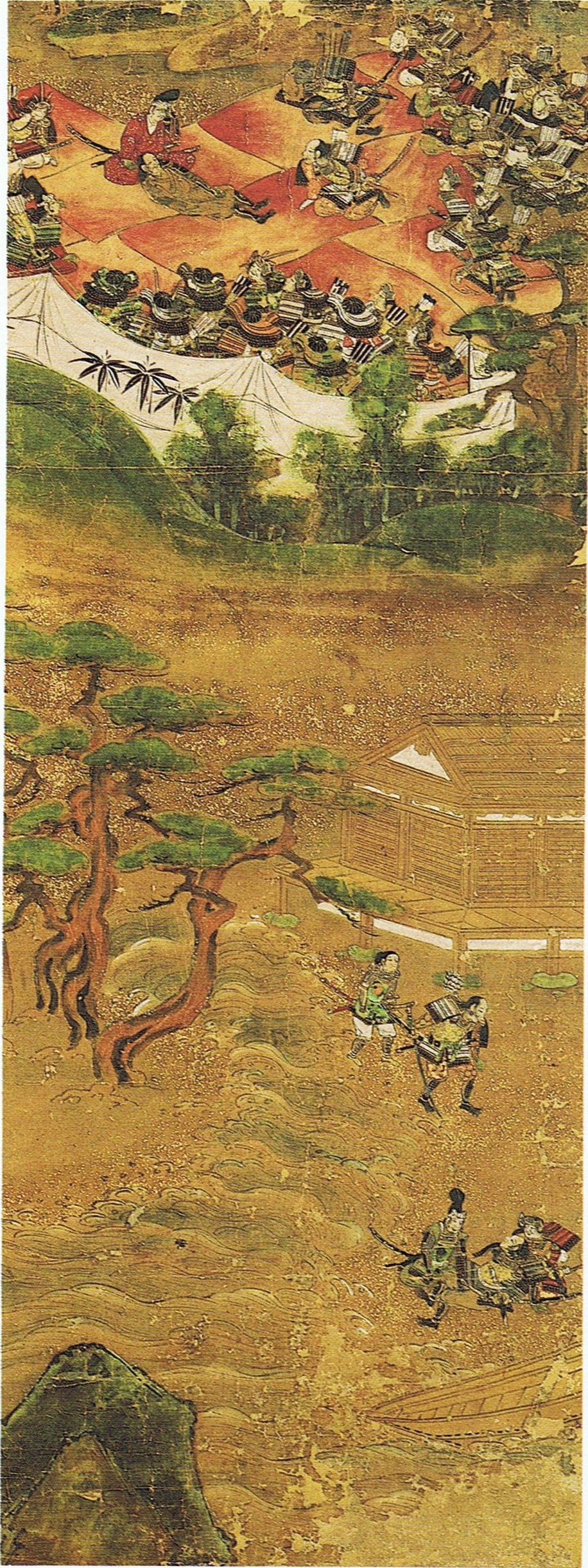 第十巻「屋島合戦」上部は義経の陣中で息絶える佐藤嗣信、下部は嗣信の首を取ろうとして佐藤忠信に射られた菊王丸